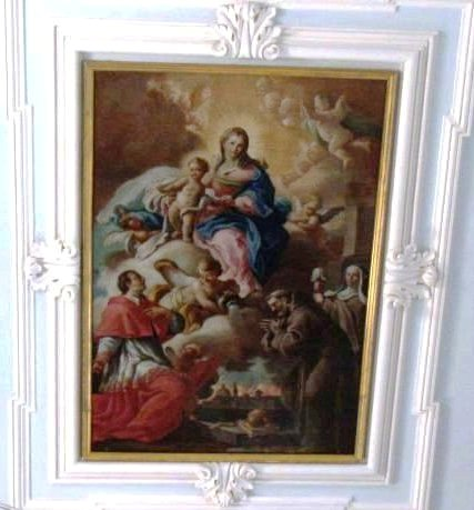 Chiesa di Santa Maria di Costantinopoli di Cerreto Sannita: particolare della volta della navata con un dipinto di Francesco Palumbo (1781) raffigurante la Madonna fra Santi.